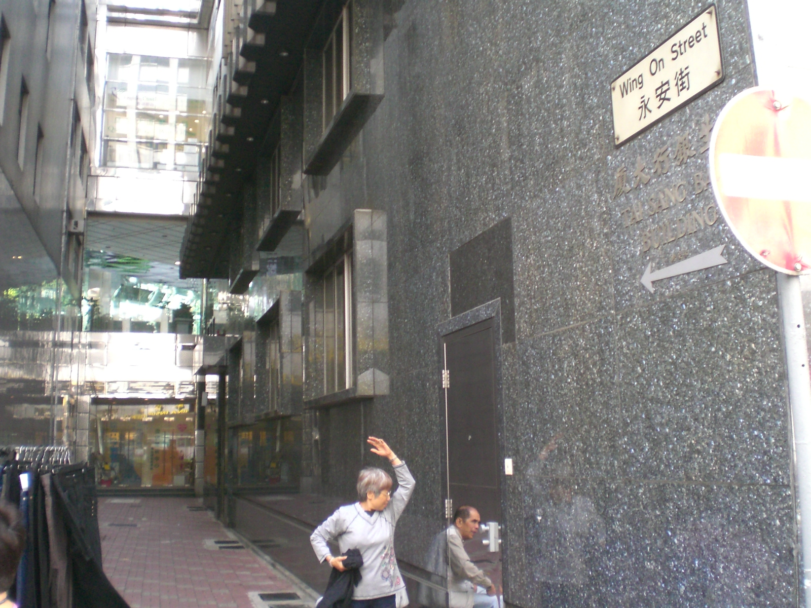 永安街近中環中心, 德輔道中, Central, Hong Kong